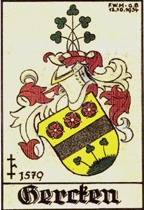 Das Familienwappen der Gercken im Todesjahr des Salzwedeler Bürgermeisters Nicolaus Gercken (1501-1579)